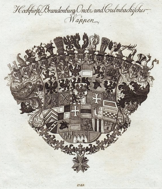 Markgräflich Brandenburg-Ansbach und -Kulmbachisches Wappen ("Hochfürstl.Brandenburg.Onolz- und Culmbachisches Wappen")(1769 - 1791)(= Gemeinsames Wappen Markgrafschaft Brandenburg-Ansbach und Brandenburg-Kulmbach = Fürstentum Bayreuth). Das Fürstenhaus von Brandenburg-Ansbach-Bayreuth ist das der Hohenzollern, die seit dem Mittelalter als Burggrafen von Nürnberg zu den in Franken regierenden Familen gehörten. Ansbachs letzter Markgraf Alexander (regierte 1757-1791) übernahm 1769 nach dem Erlöschen der Bayreuther Linie beide fränkische Hohenzollernfürstentümer -Ansbach und Bayreuth- in Personalunion. Unter anderem ist im Wappen von Ansbach-Bayreuth das Wappen der Schenken von Limpurg (im Schildfuß). 15 Helme ruhen auf dem Schild, der in 33 Felder aufgeteilt ist und zusätzlich einen aufgelegten (erhöhten) Herzschild mit dem markgräflich-brandenburgischen Adler trägt.